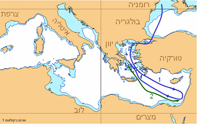 אגיאוס ניקולאוס 1 - מסלול